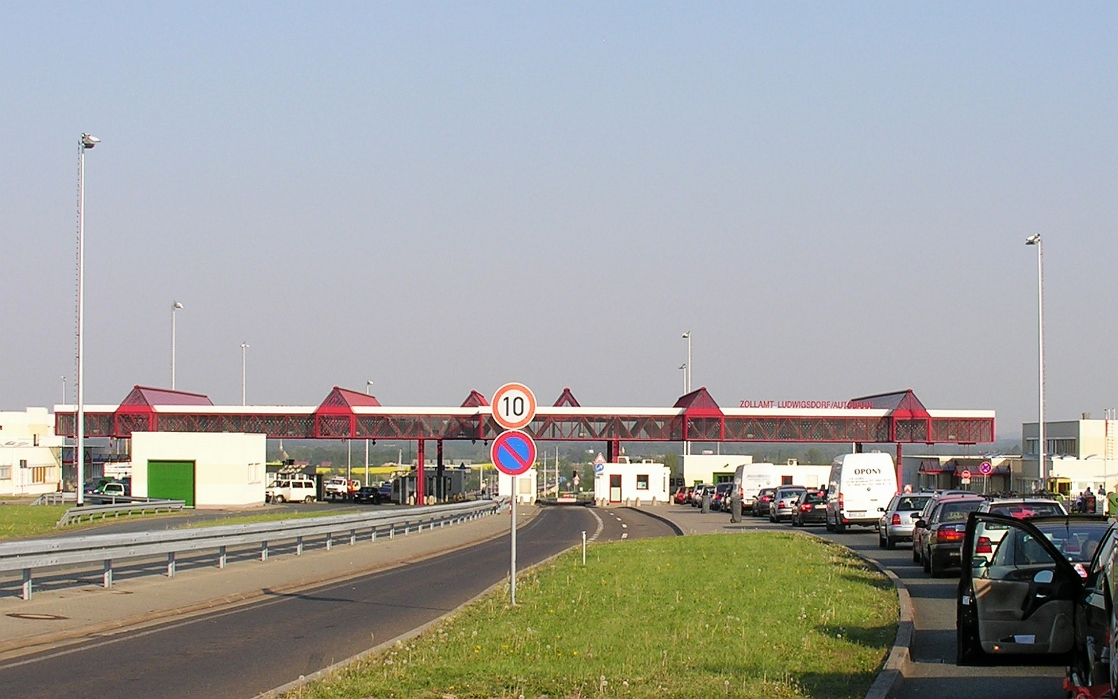 Bundesautobahn 4 (BAB 4): Ehemaliger deutsch-polnischer Grenzübergang Ludwigsdorf bei Görlitz. Die Gebäude wurden mittlerweile zurückgebaut.